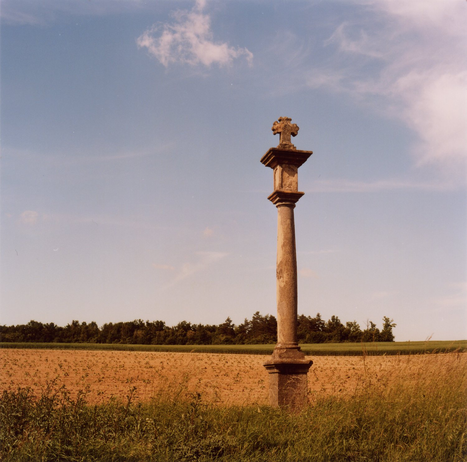 Raaberkreuz